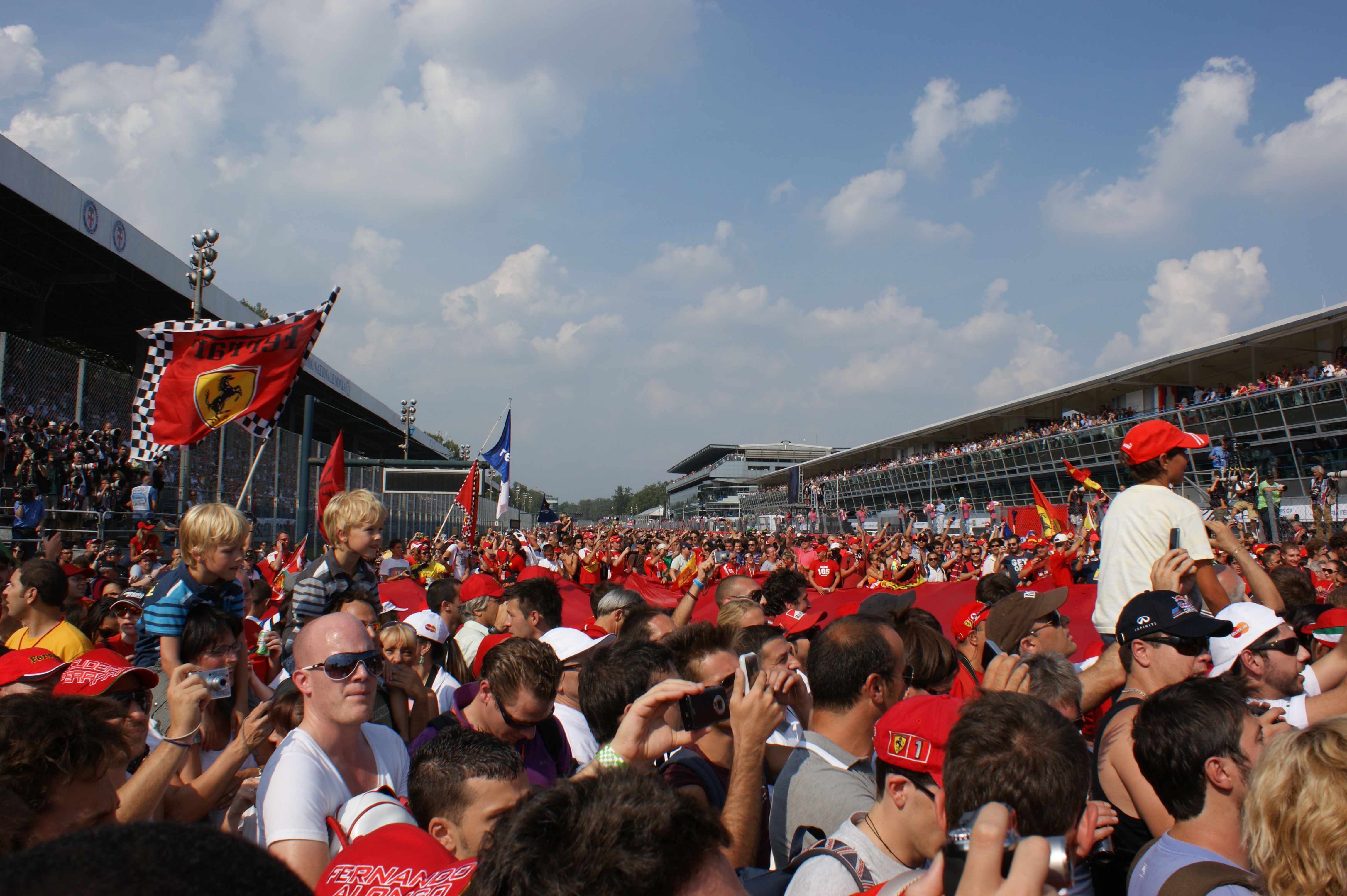 I tifosi sul rettilineo d'arrivo per la festa del podio Monza 2011